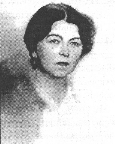 Potret Marii Kasterskiej